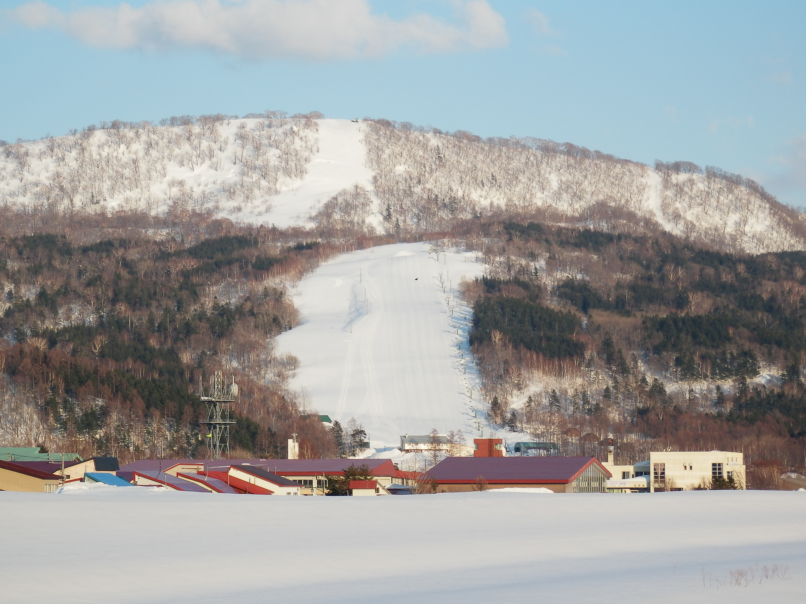 音威富士スキー場全景